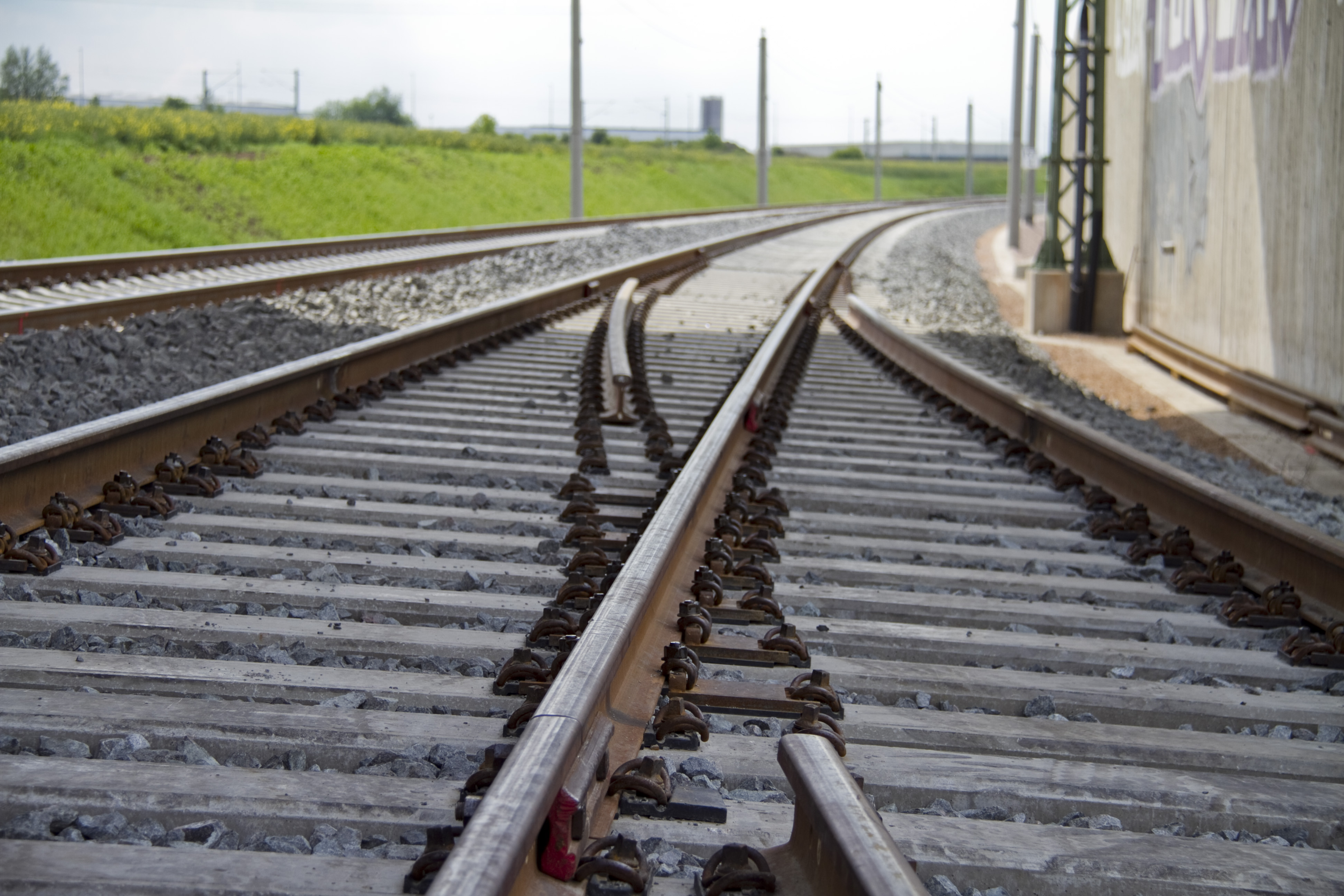 NBS Erfurt Leipzig/Halle - Zungen- und herzstücklose Anbindung (ZHA) an das Umspannwerk Erfurt Vieselbach